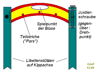 Schema einer Reiterlibelle mit Justierschraube. Die Einkerbung der 2 Stützen ist quer zur Zeichenebene zu denken